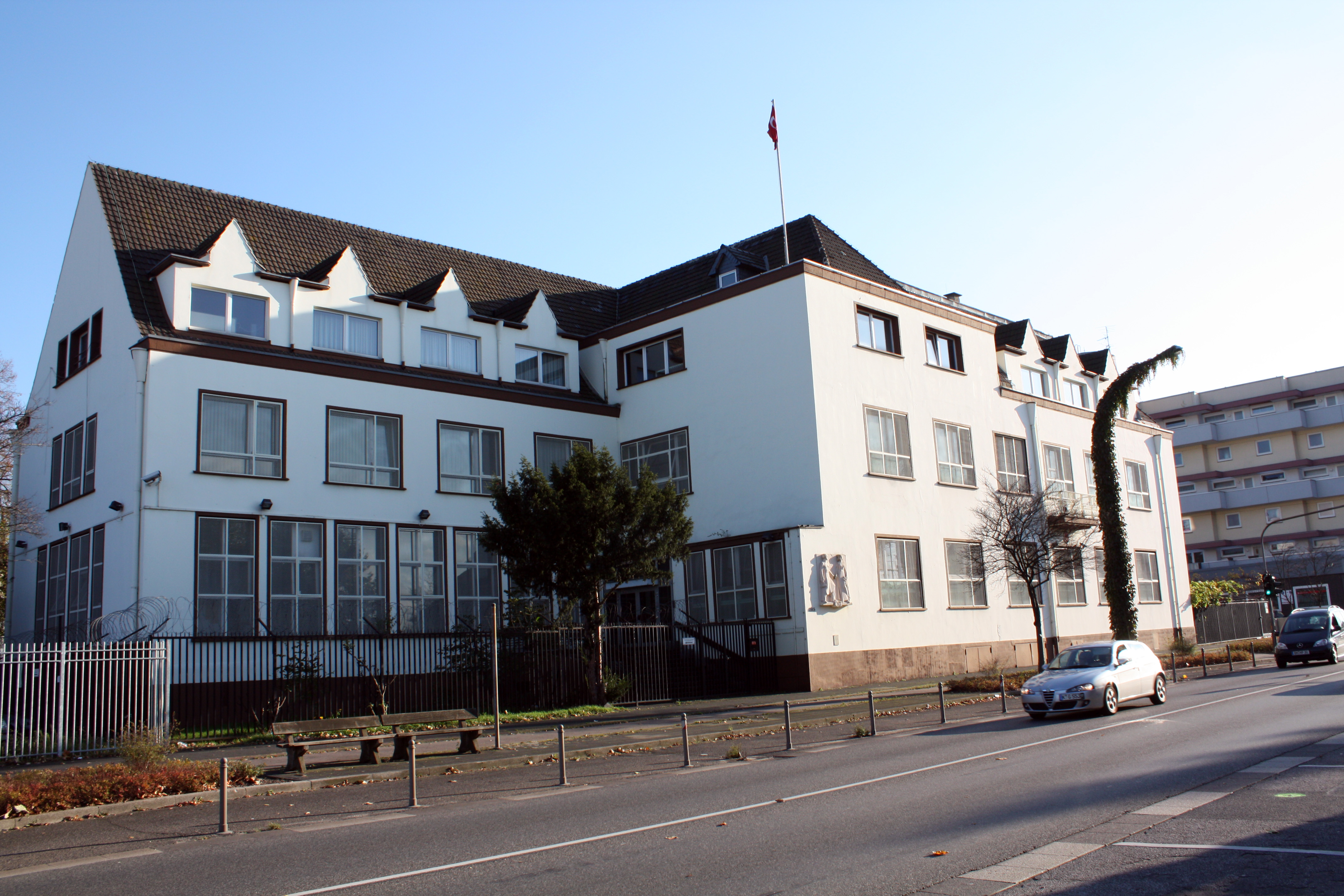 Hermülheim (Hürth), Türkisches Generalkonsulat Luxemburger Straße